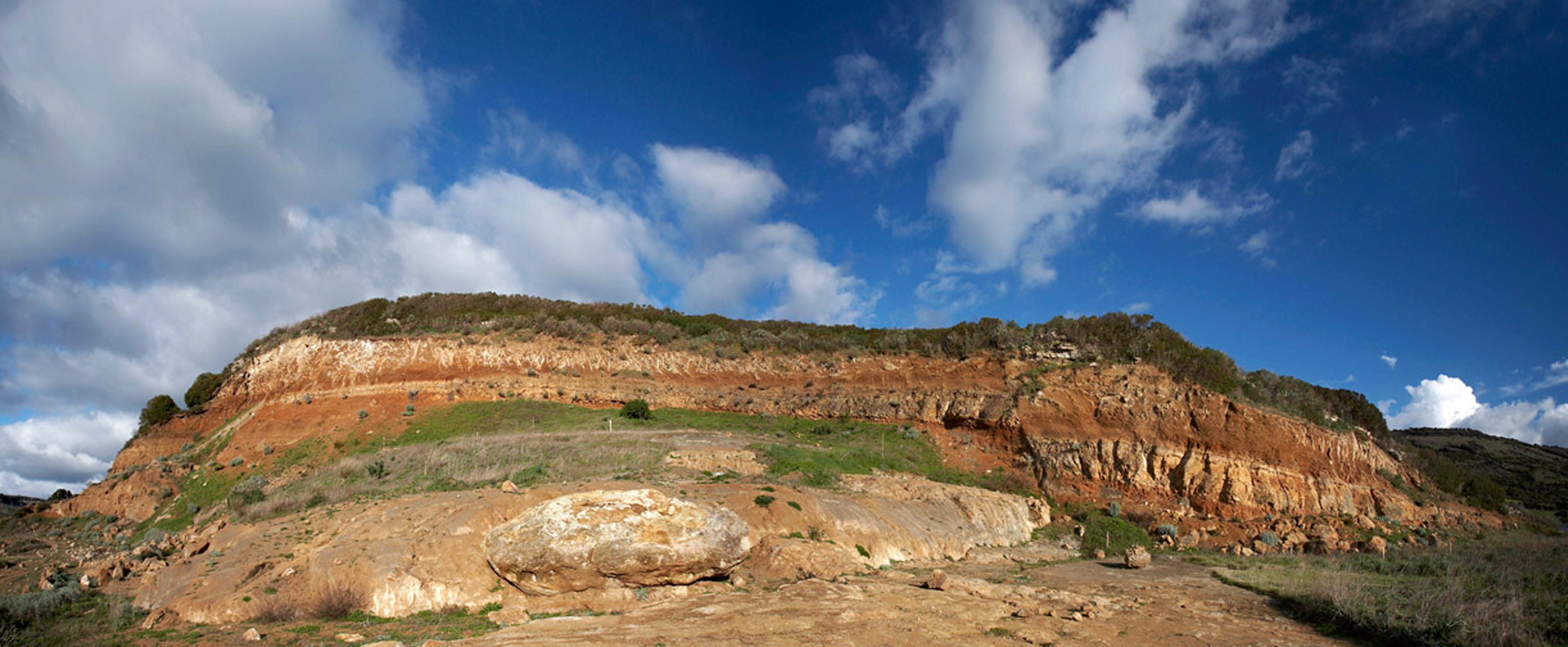 Vista frontale della cava Duidduru